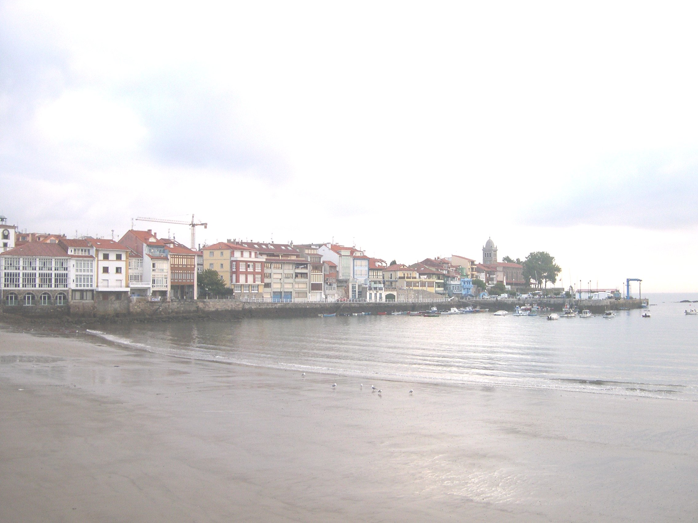 Imaxen de Lluanco